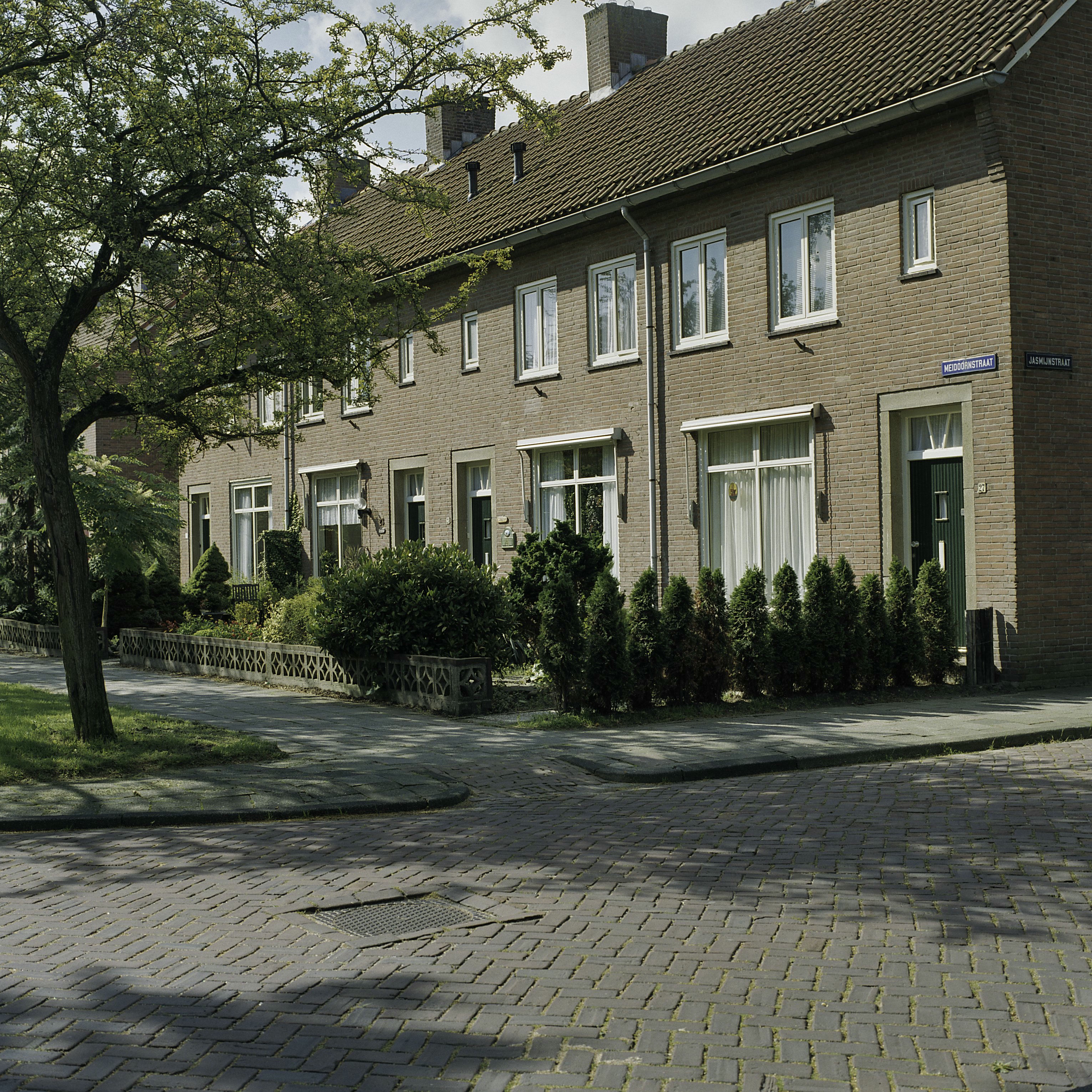 Eengezinswoning: Voorzijde van eengezinswoningen (opmerking: Gefotografeerd voor Monumenten In Nederland Flevoland)